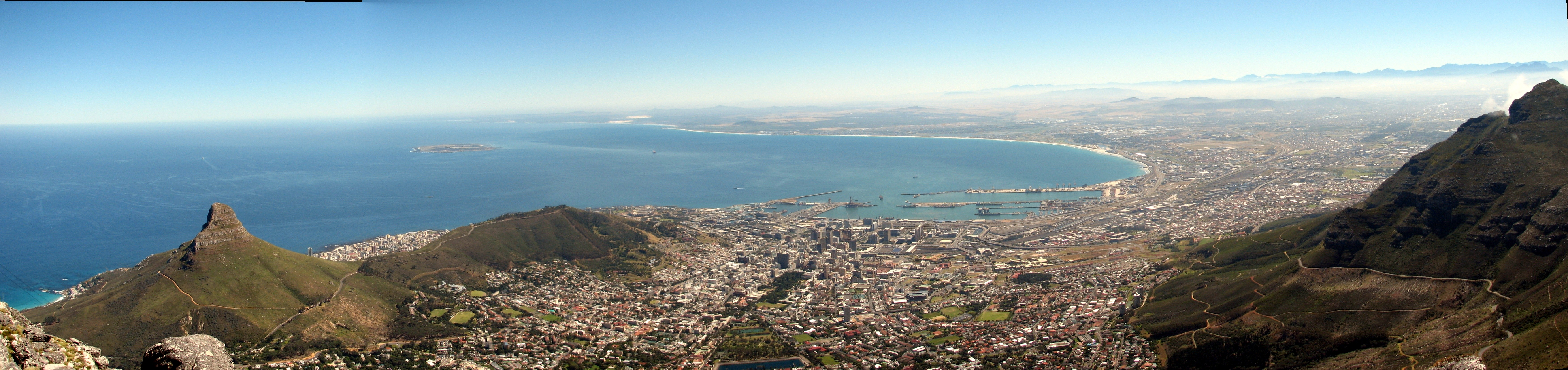 Bucht von Kapstadt, vom Tafelberg